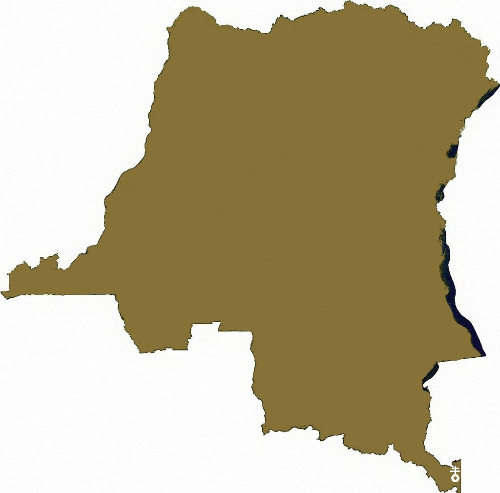 kaart congo